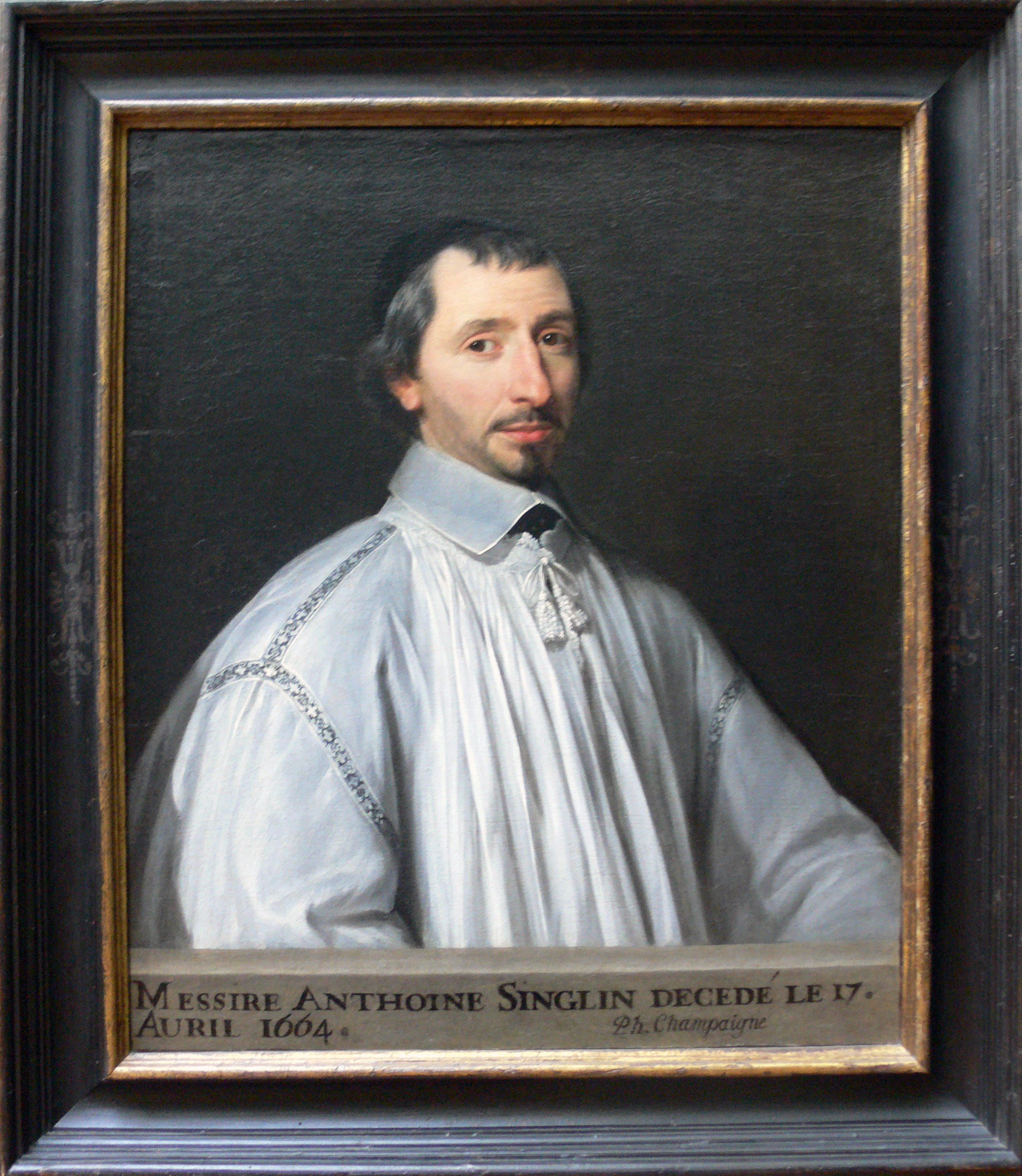 Portrait d'Antoine Singlin par Philippe de Champaigne, huile sur toile, vers 1646. Los Angeles, Getty Museum, 87.PA.3